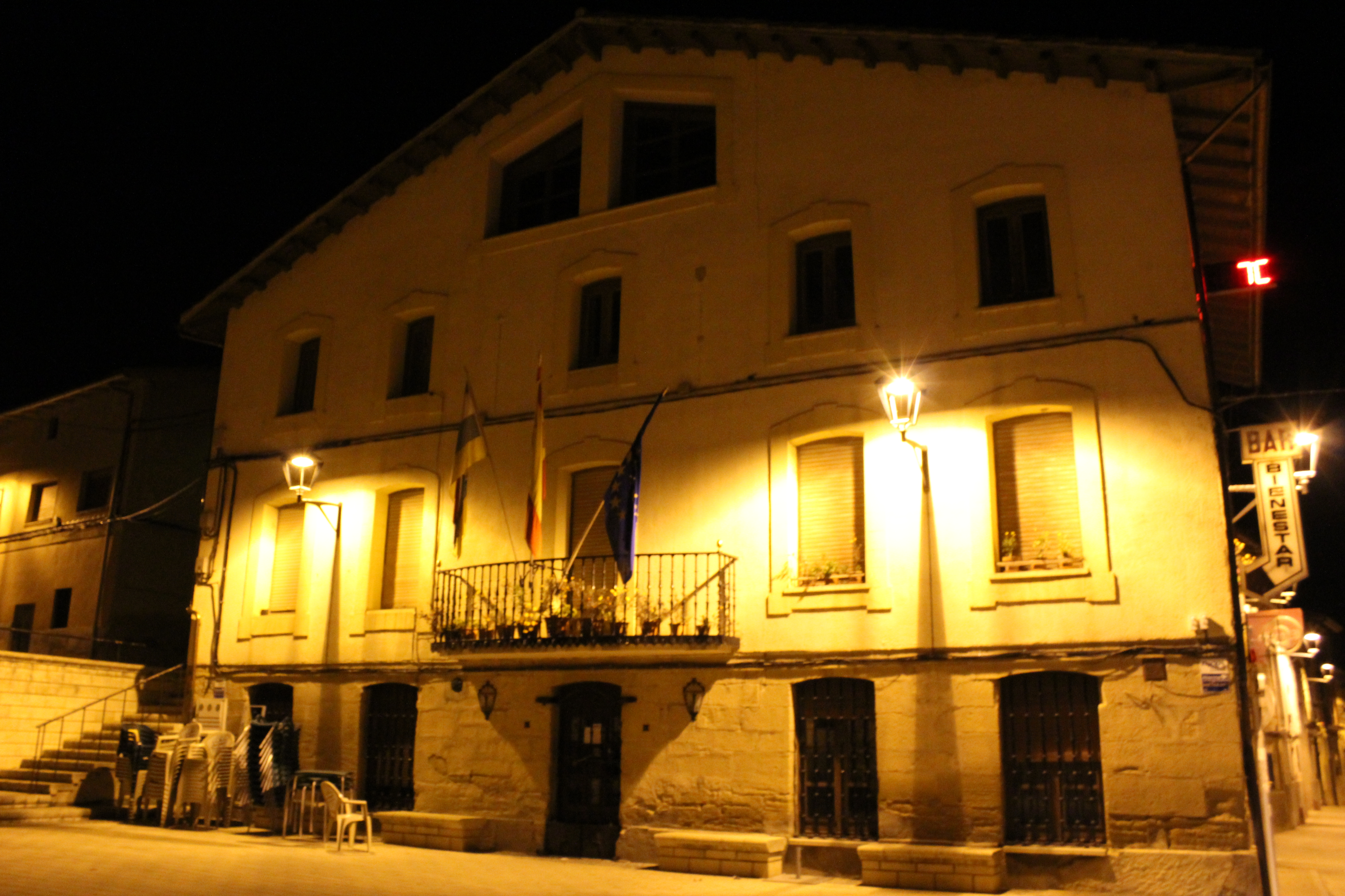 Ayuntamiento-2